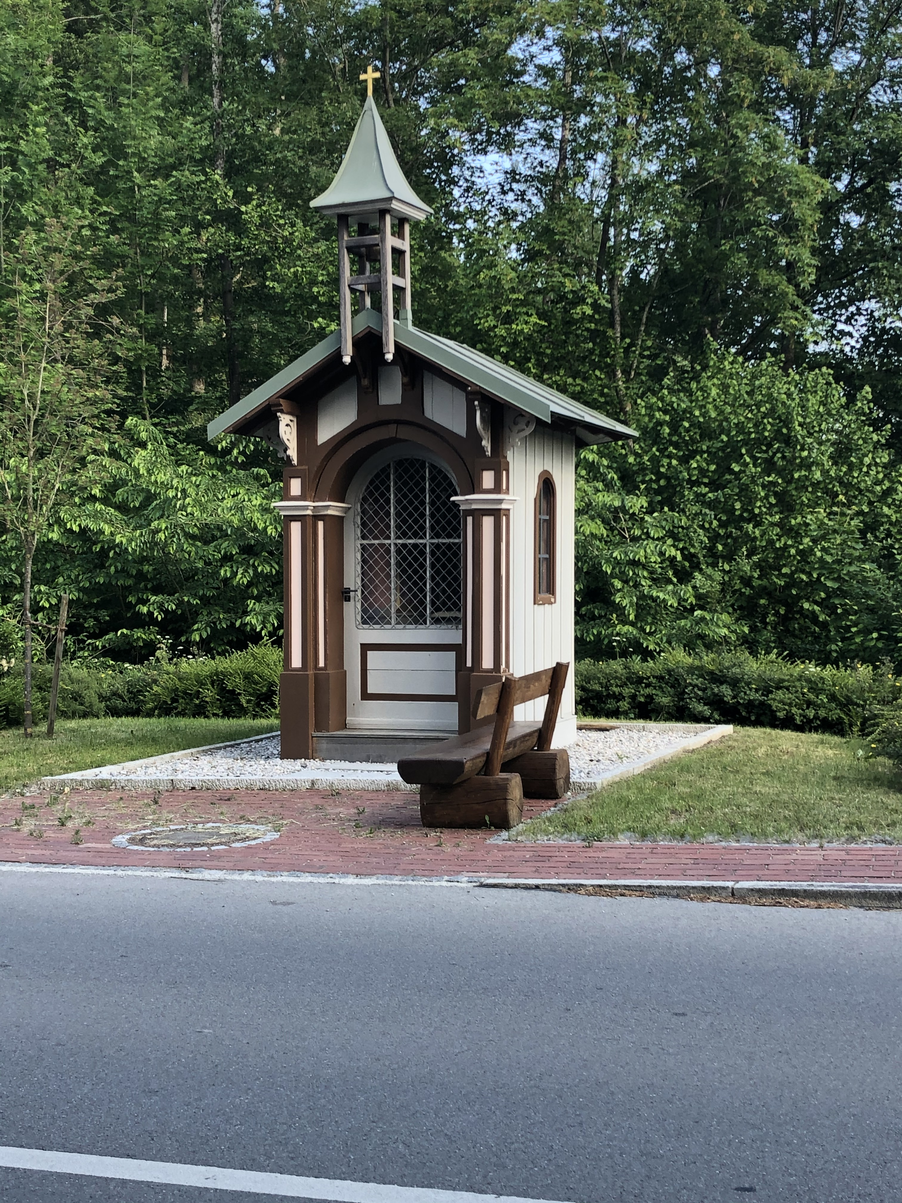 Die Kapelle an der Landkreisgrenze Dachau-Fürstenfeldbruck